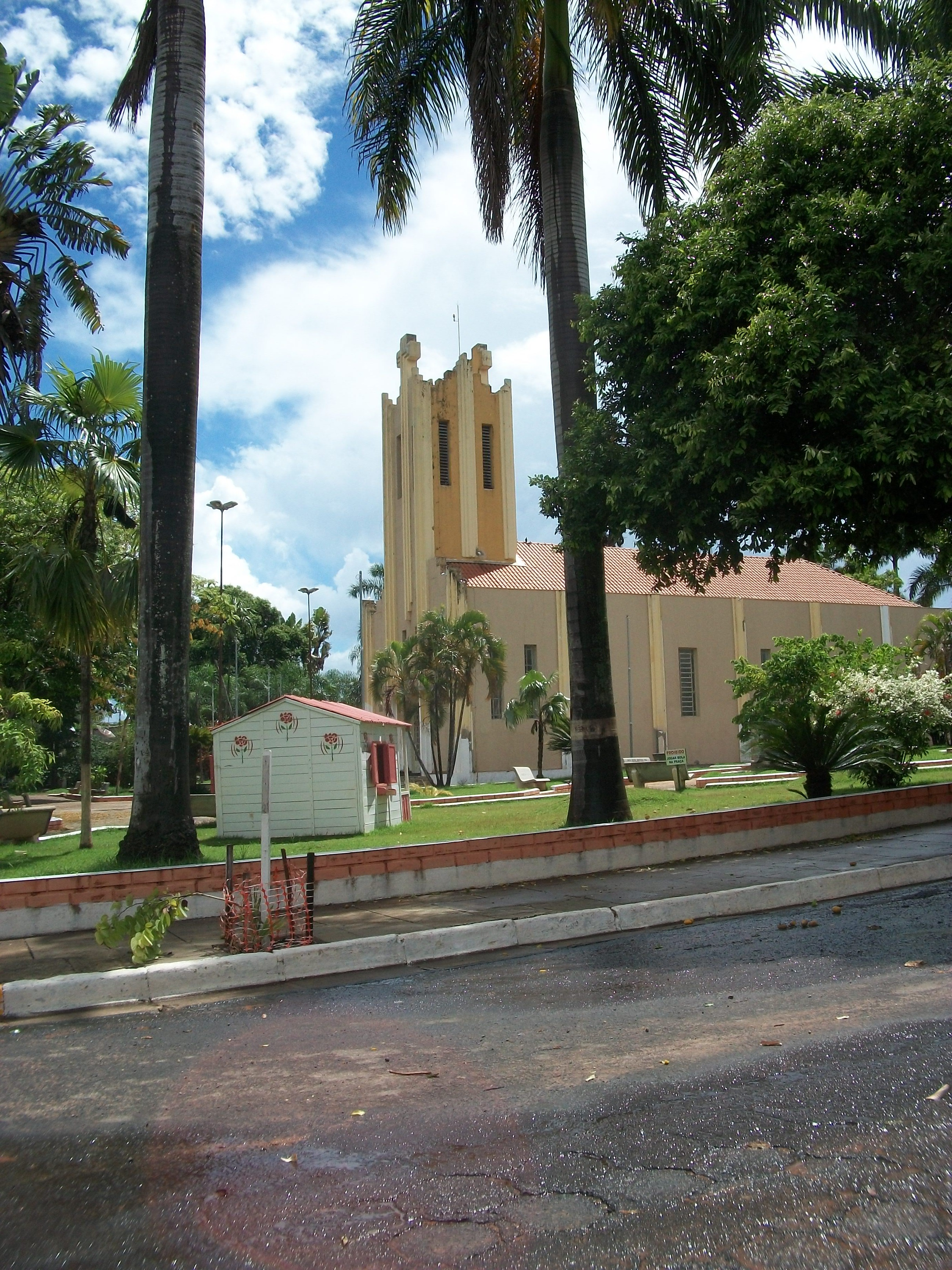 Igreja de Bento de Abreu, São Paulo, Brasil